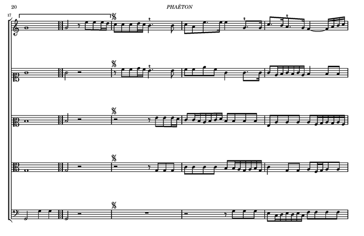 средний раздел увертюры «Фаэтон»